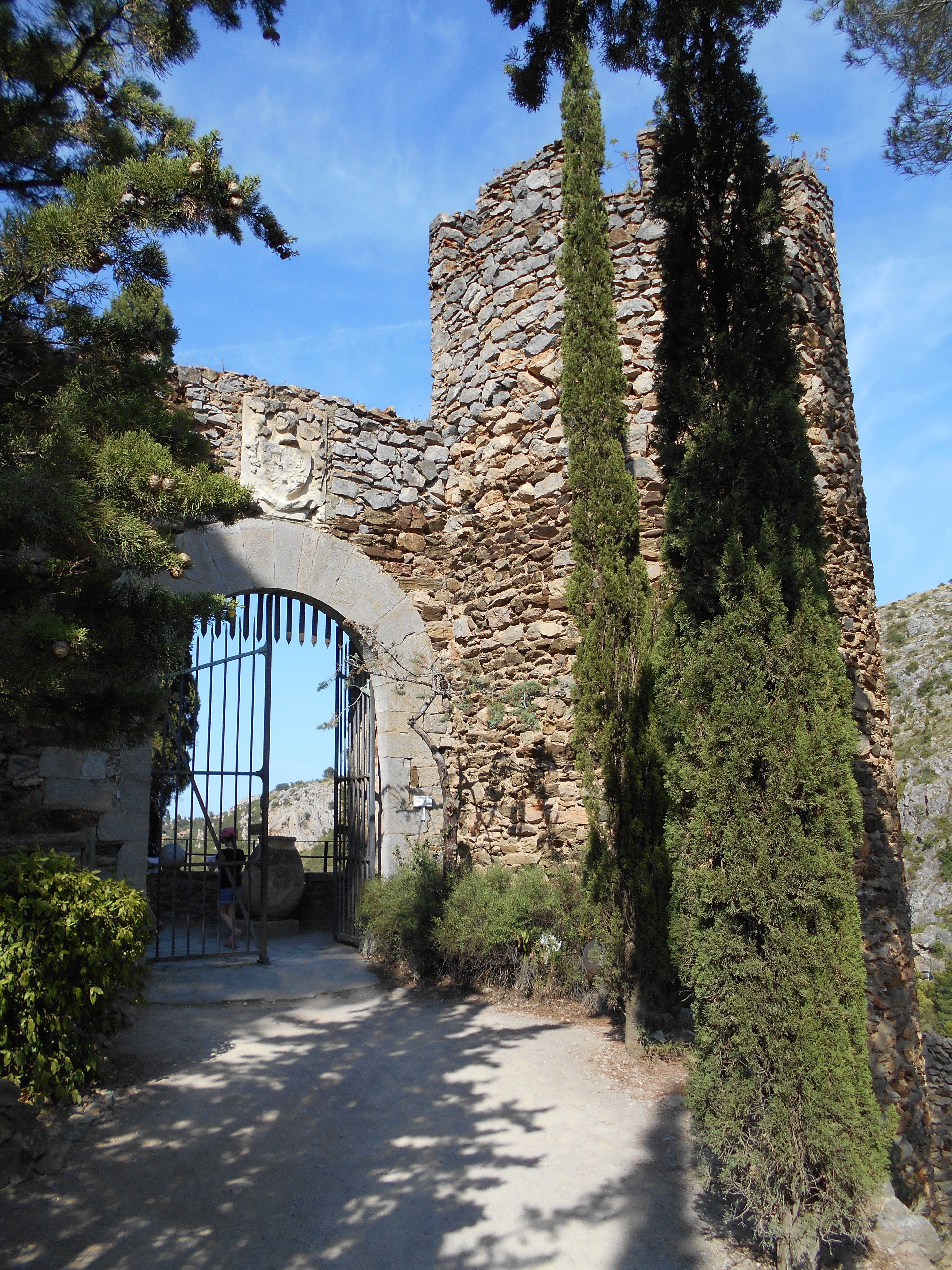 Torre del Castell de Castellnou